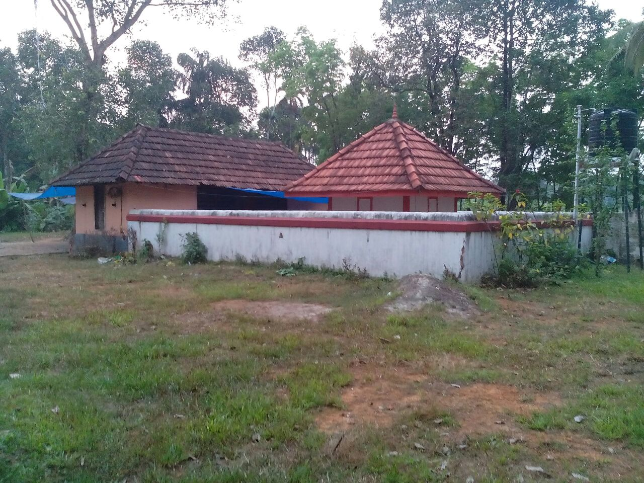 elangavathu kavu is a bhadrakali temple. situated near varappetty, moovatupuzha, Ernakulam dist, kerala india